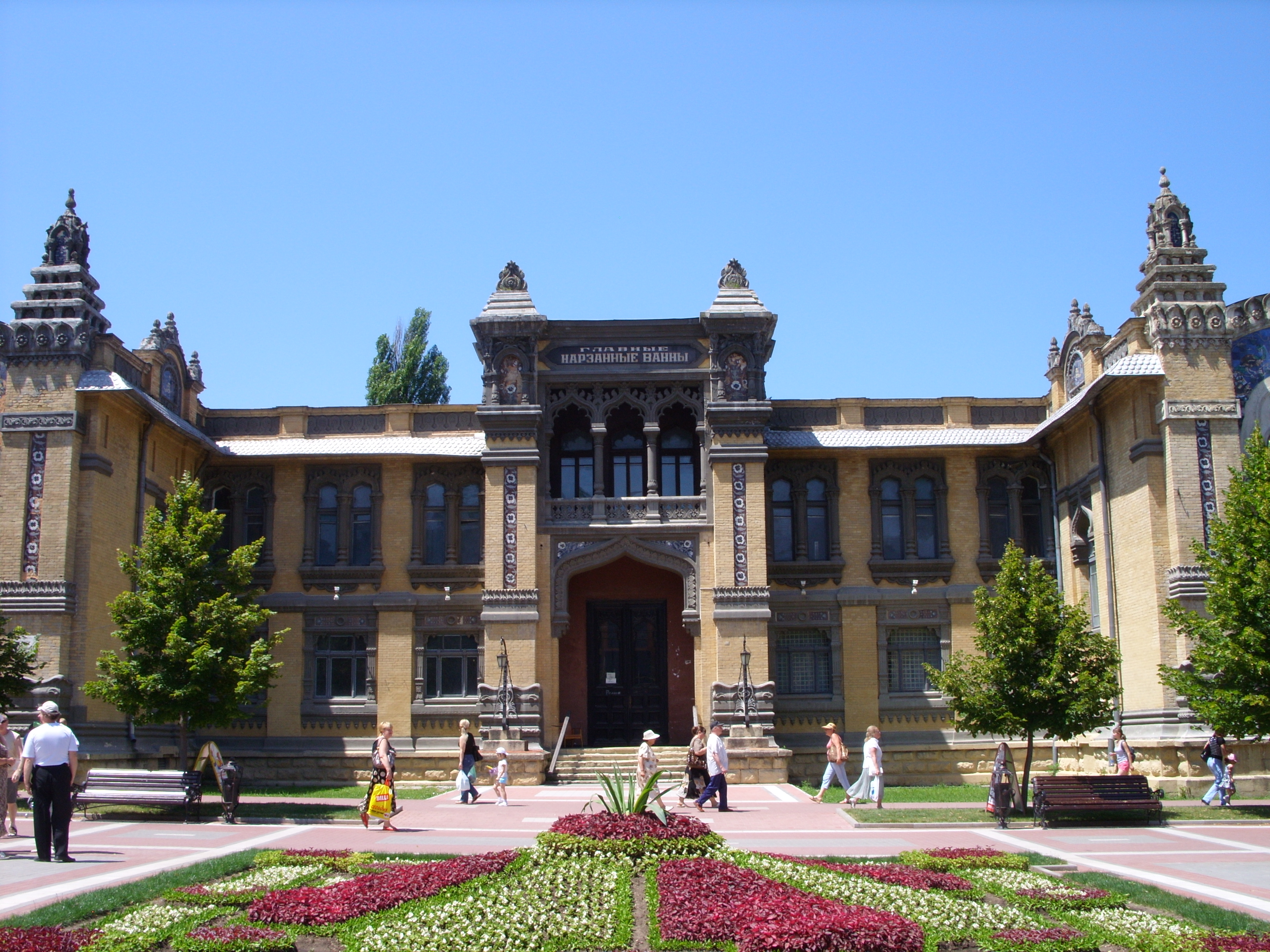 Нарзанные ванны в Кисловодске, июль 2009 г.